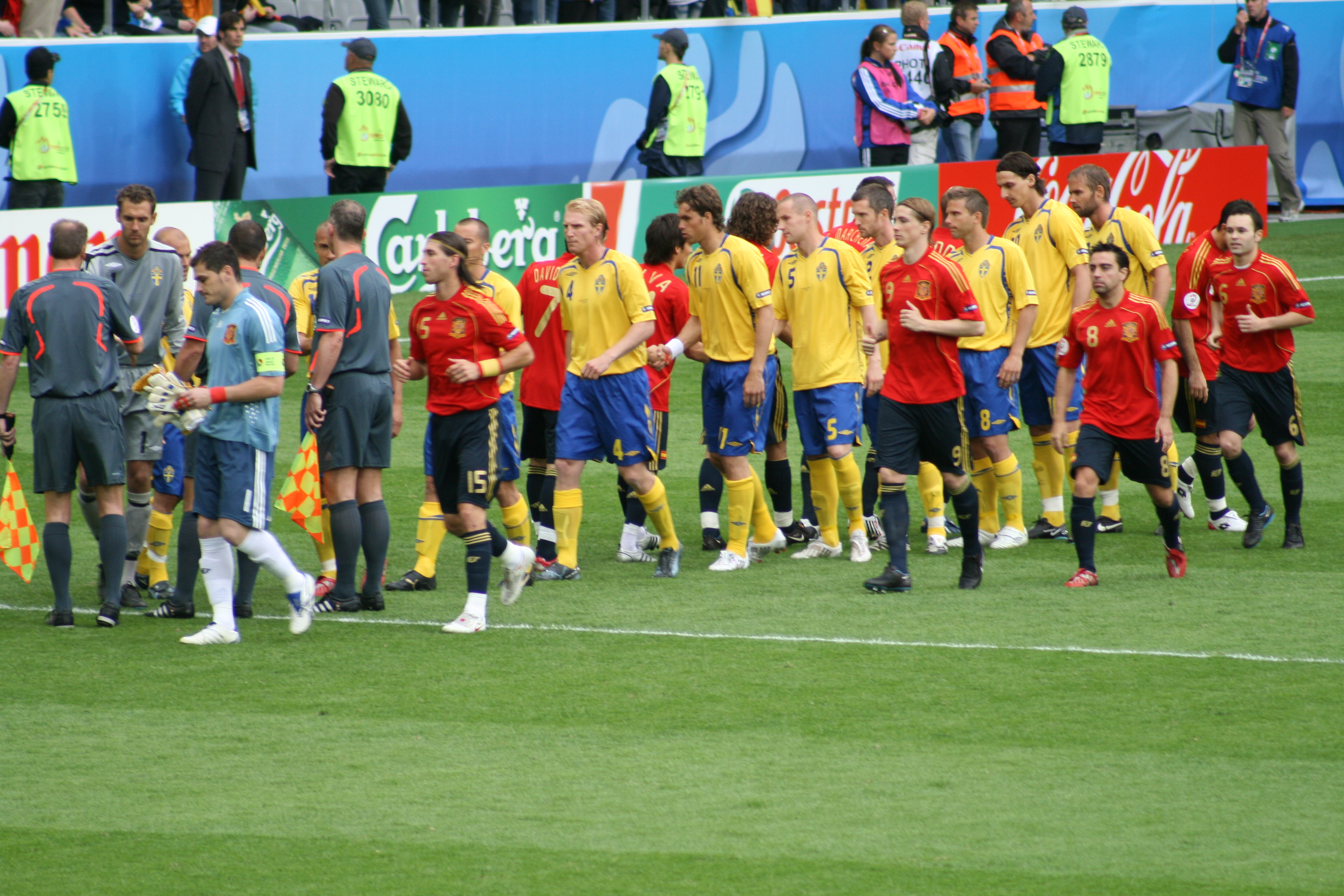 Los jugadores saltan al campo antes del partido Suecia - España de la Eurocopa 2008, en el estadio Tivoli Neu (Innsbruck)